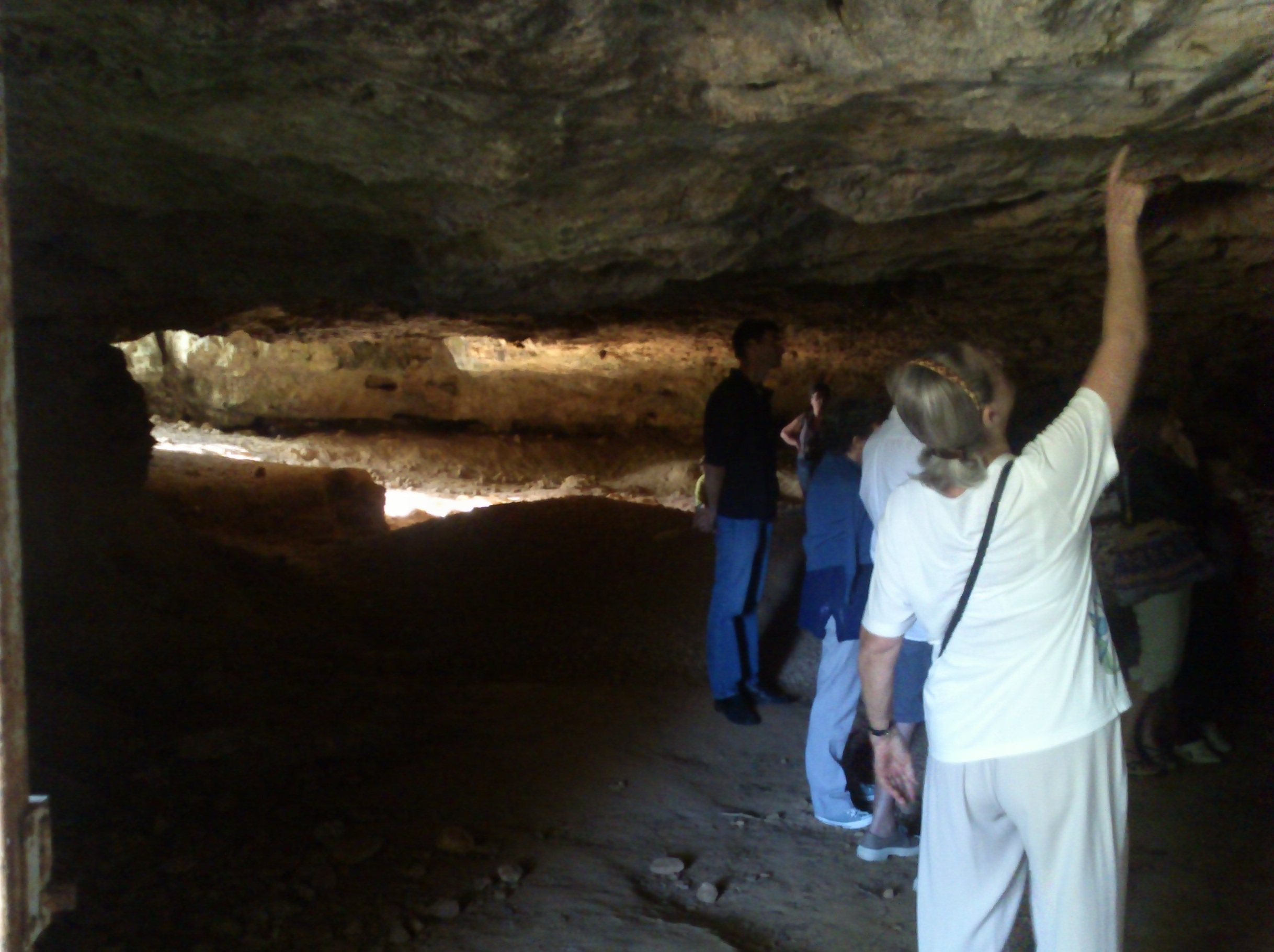 Grotte de La Marche, site préhistorique magdalenien